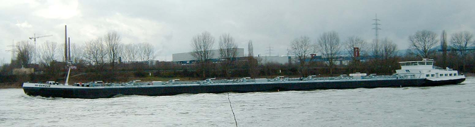 Tankschiff Va-Banque (Jowi-Klasse)